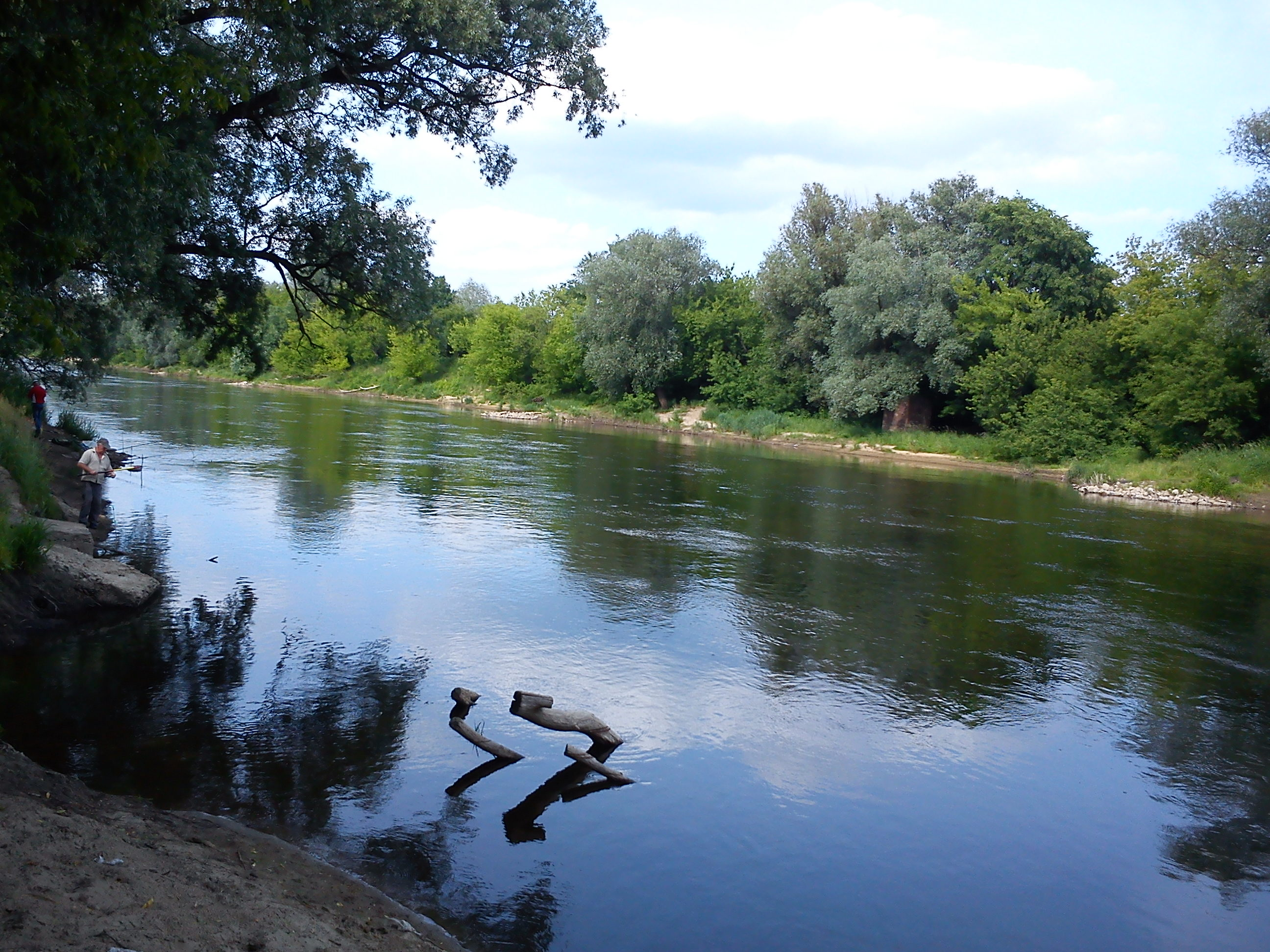 Warta na Starołęce/Dębinie, Poznań.